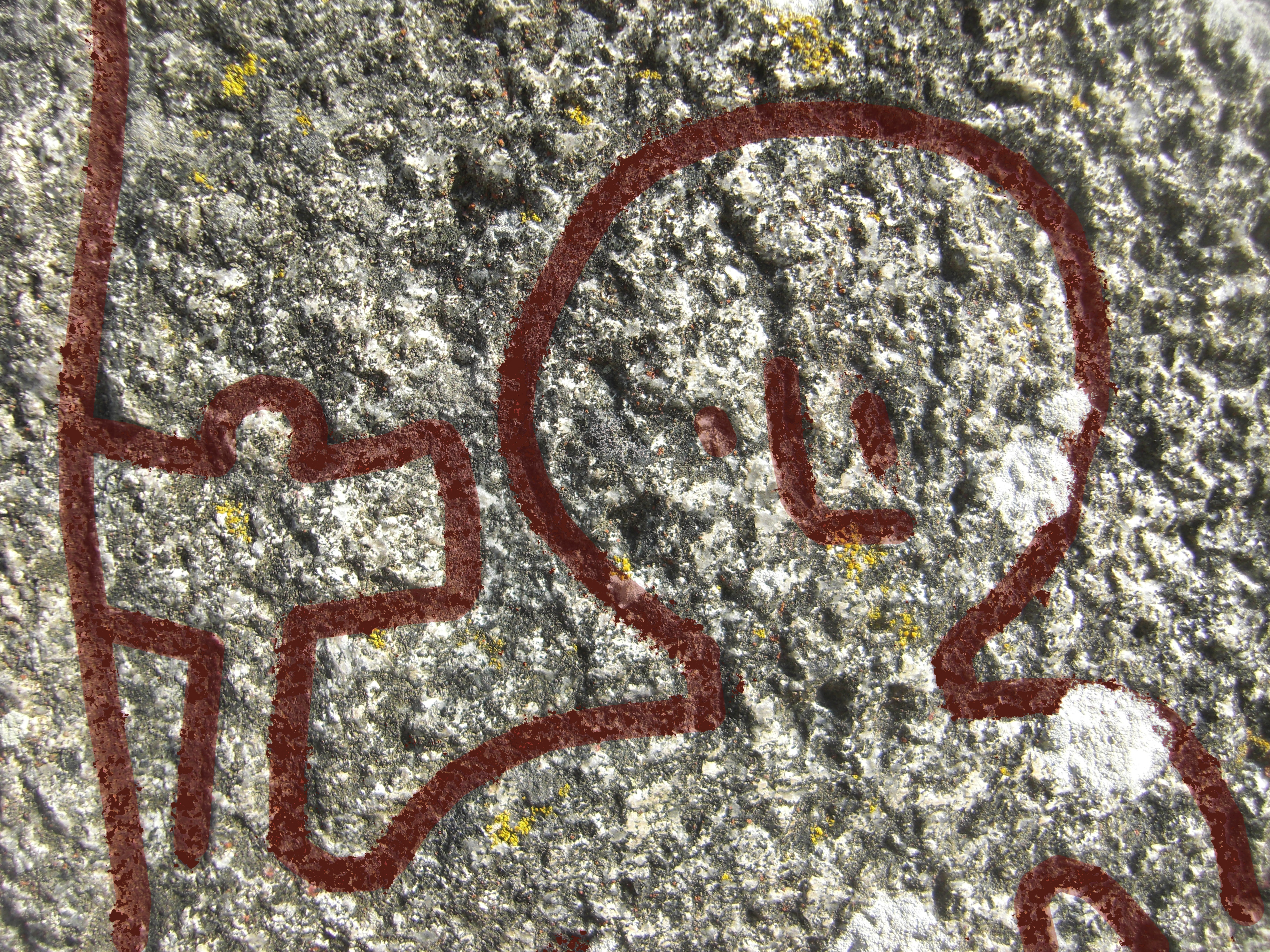 Altunastenen U 1161 (RAÄ-nr Altuna 42:1) vid Altuna kyrka, Altuna socken, Simtuna härad, Fjädrundaland, Enköpings kommun, Uppsala län, Uppland, Sverige. Detalj föreställande guden Tors huvud och hans höjda hammare Mjölner.